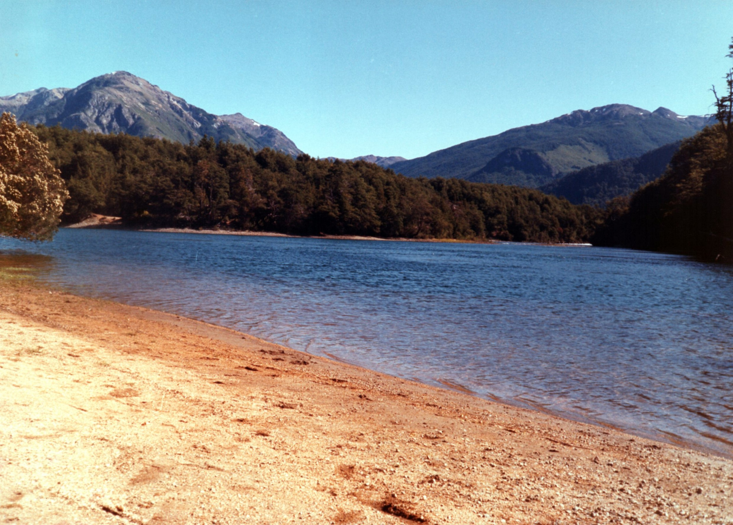 Playa de arena del Río Arrayanes. Parque Nacional Los Alerces (prov. de Chubut).